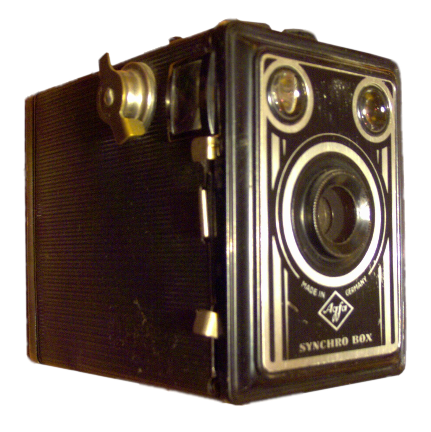 Selbst aufgenommen, gemeinfrei